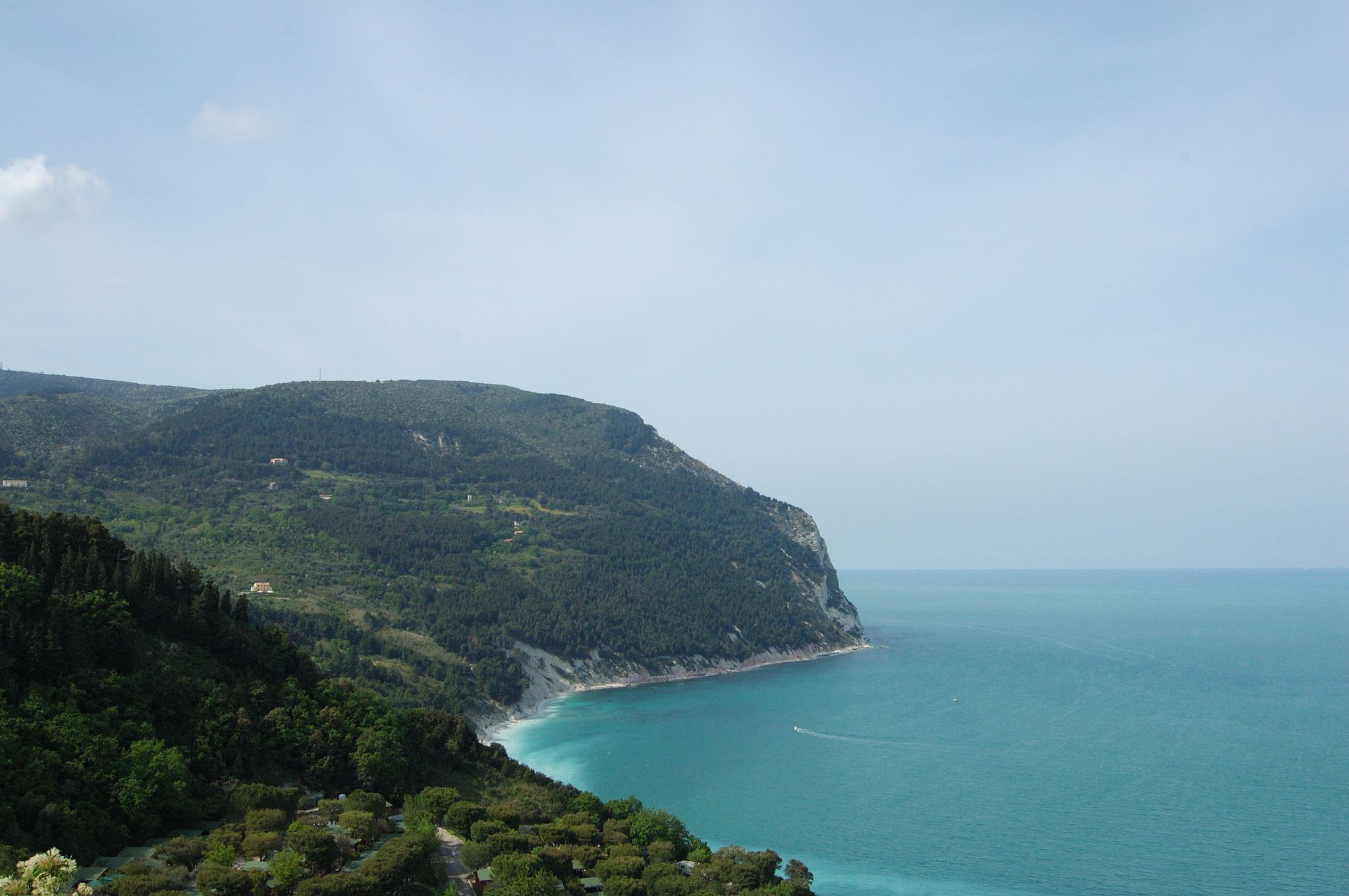 Sirolo, Marche, Italia